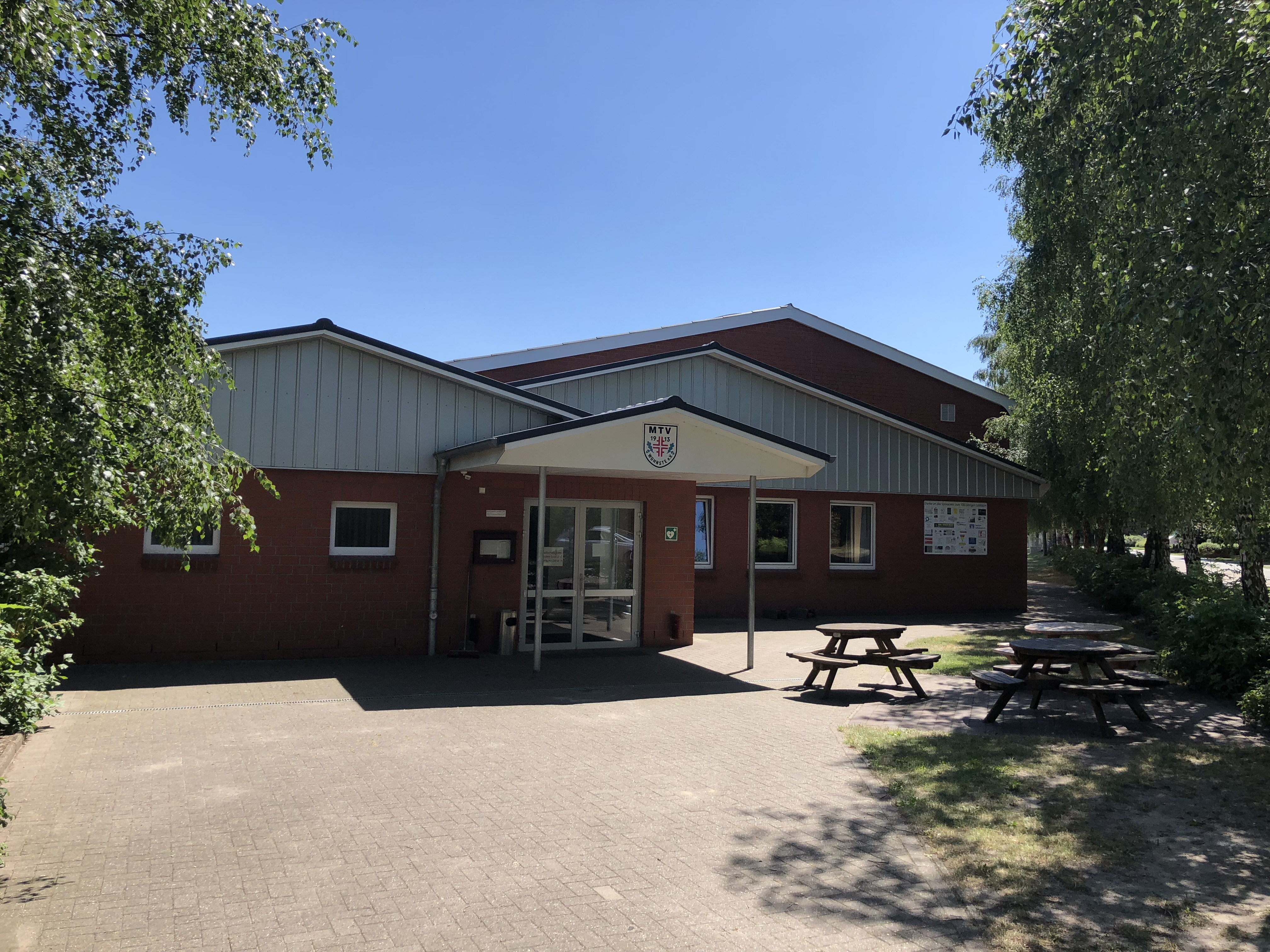 Vereenshuus MTV Woonst